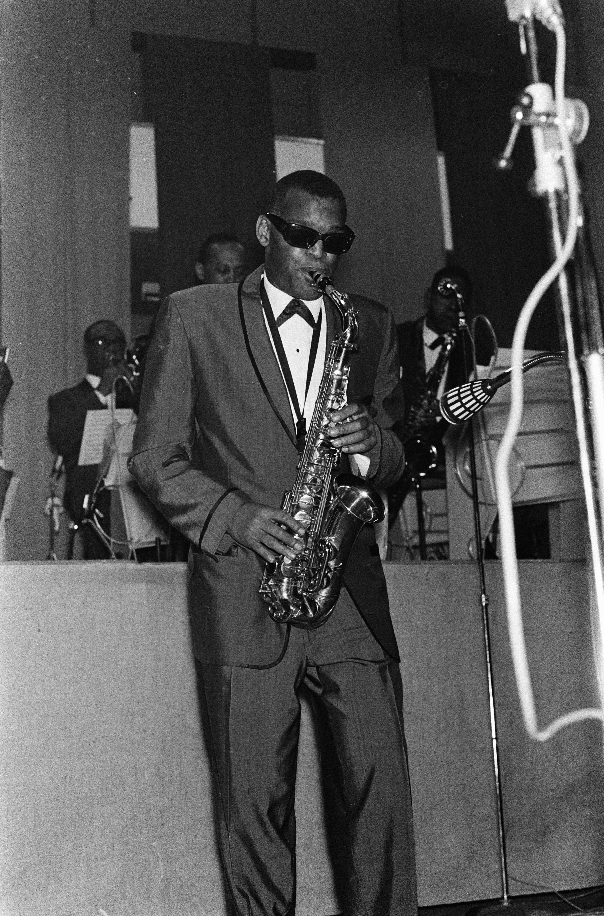 Collectie / Archief : Fotocollectie Anefo Reportage / Serie : [ onbekend ] Beschrijving : Nachtconcert van Ray Charles in RAI-gebouw. Ray Charles Datum : 11 mei 1963 Trefwoorden : concerten Persoonsnaam : Charles, Ray Fotograaf : Gelderen, Hugo van / Anefo Auteursrechthebbende : Nationaal Archief Materiaalsoort : Negatief (zwart/wit) Nummer archiefinventaris : bekijk toegang 2.24.01.05 Bestanddeelnummer : 915-1483